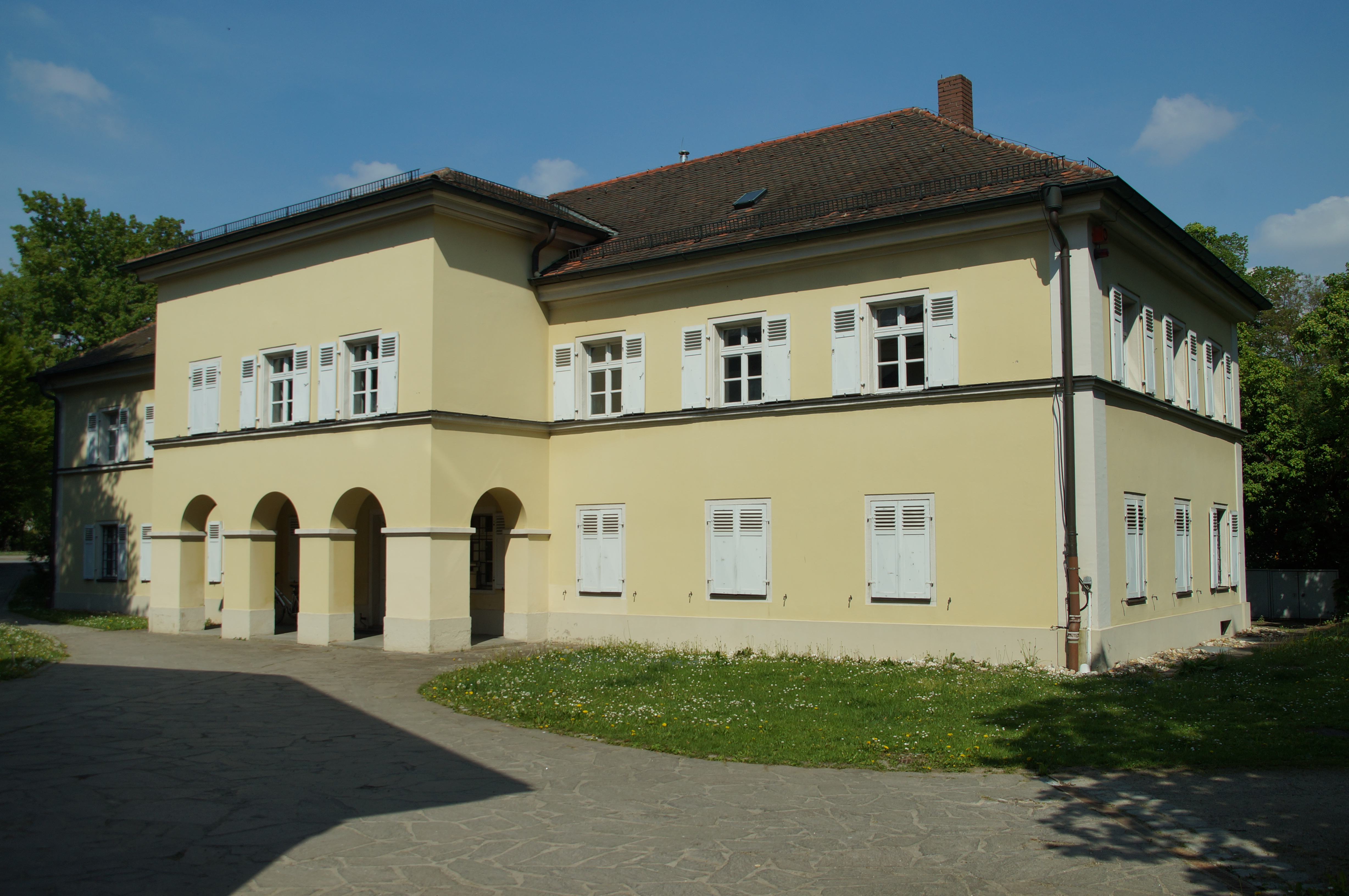 Ehemaliges Schießhaus der, Pürschbüchsenschützengesellschaft zweigeschossiger Walmdachbau mit Vorbauten, Gesimsgliederung und Ecklisenen, 1836/37, im Kern 18. Jahrhundert, Umbauten 1910 This is a photograph of an architectural monument.